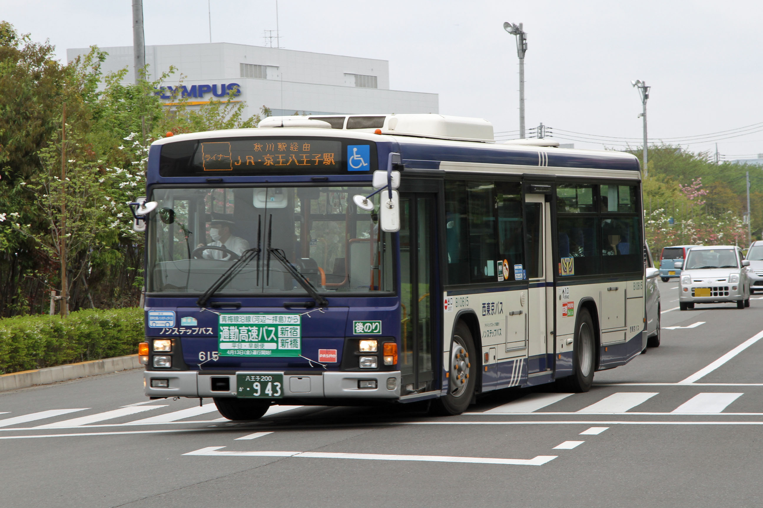 Nishi Tokyo Bus "Leisure & Shopping Liner" 西東京バス「レジャー&ショッピングライナー」